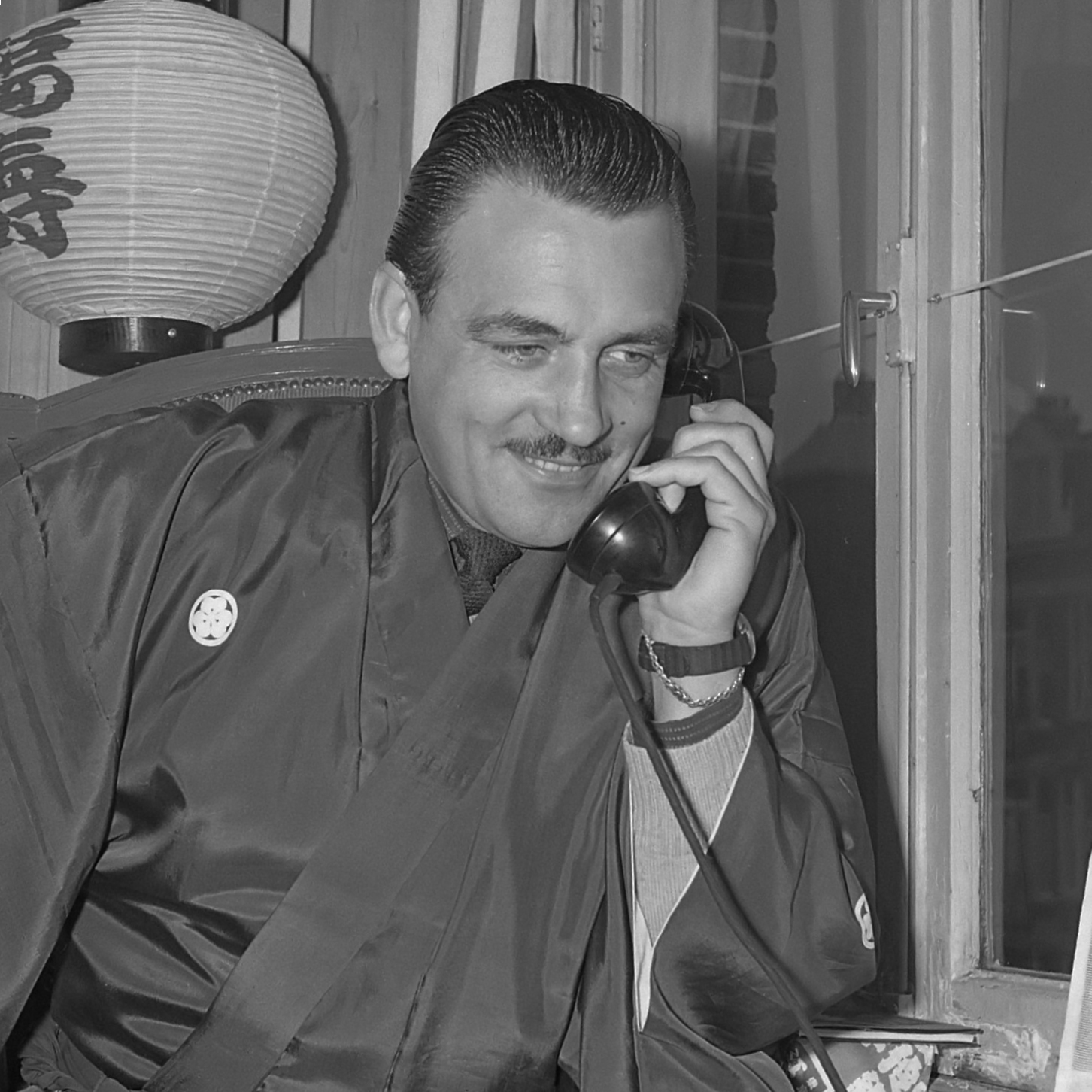 Opdracht Parool Bob Verstraete 1 april 1963